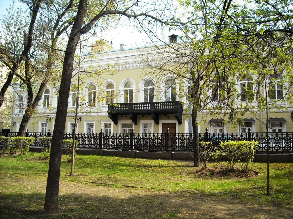 Gogolevskiy Blv to Дом Ильинских Л. М. и А. М.